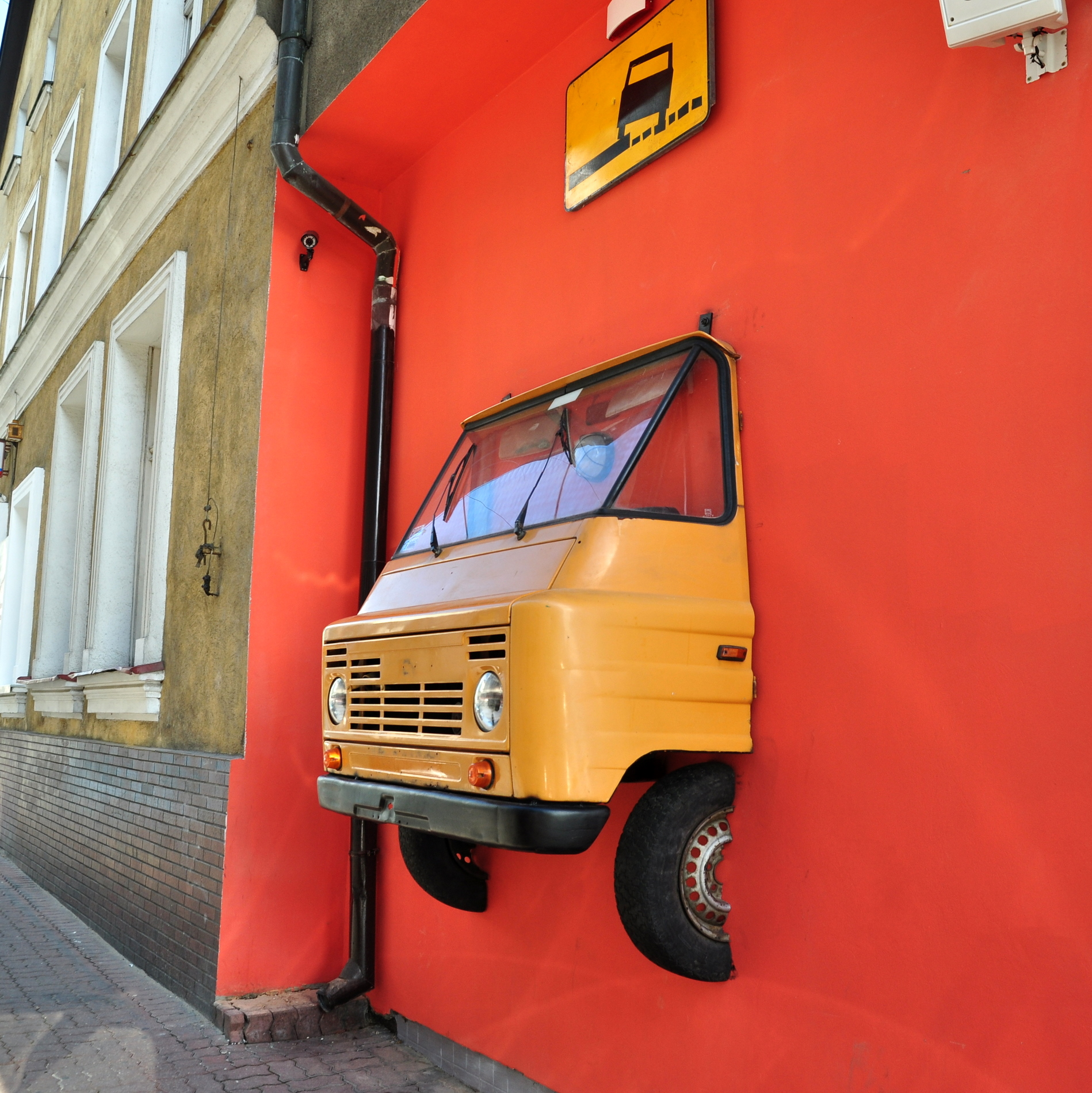 Jako element reklamy klubu nawiązującego do czasów PRL-u ( Gorzów Wlkp.)